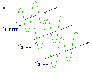 Nicht-kohärente Sendeimpulse aus (hier) drei Impulsperioden (PRT) beginnen mit einer zufälligen Phase